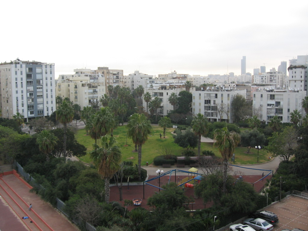 shikoon lamed